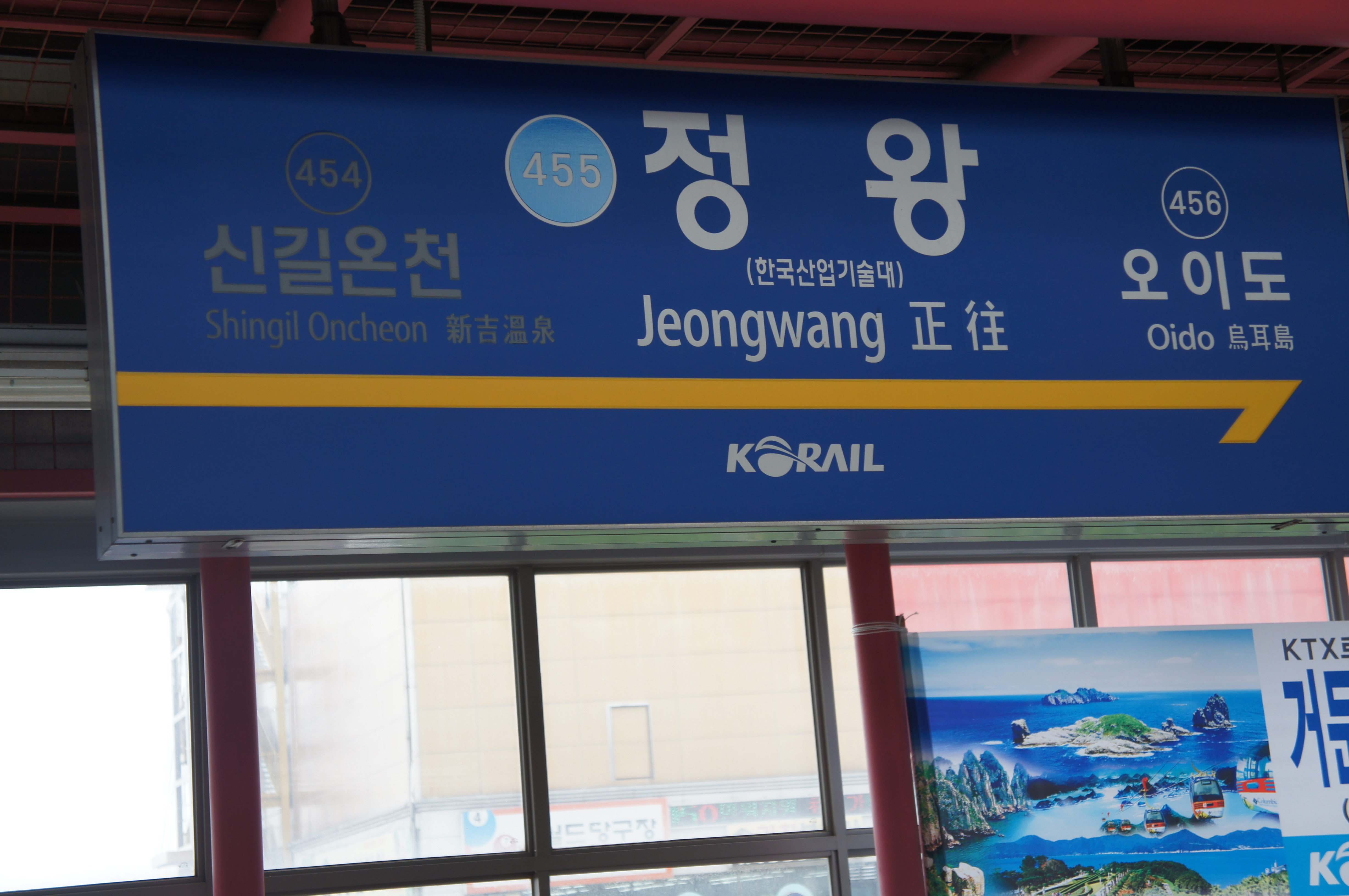 정왕역 역명판